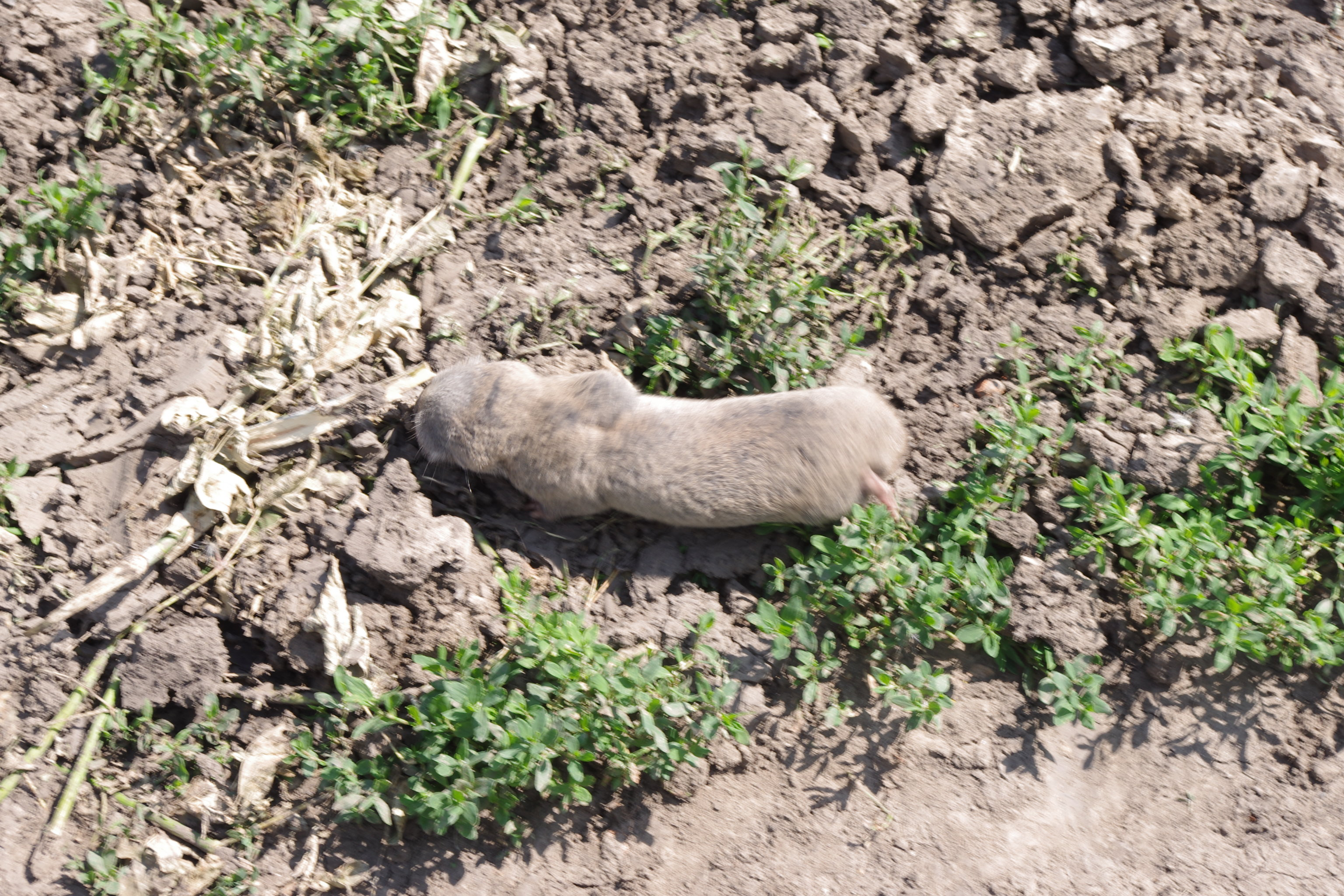 Слепыш